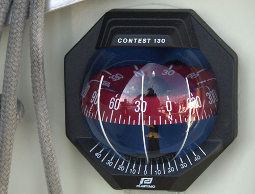 Schiffskompass einer Segelyacht